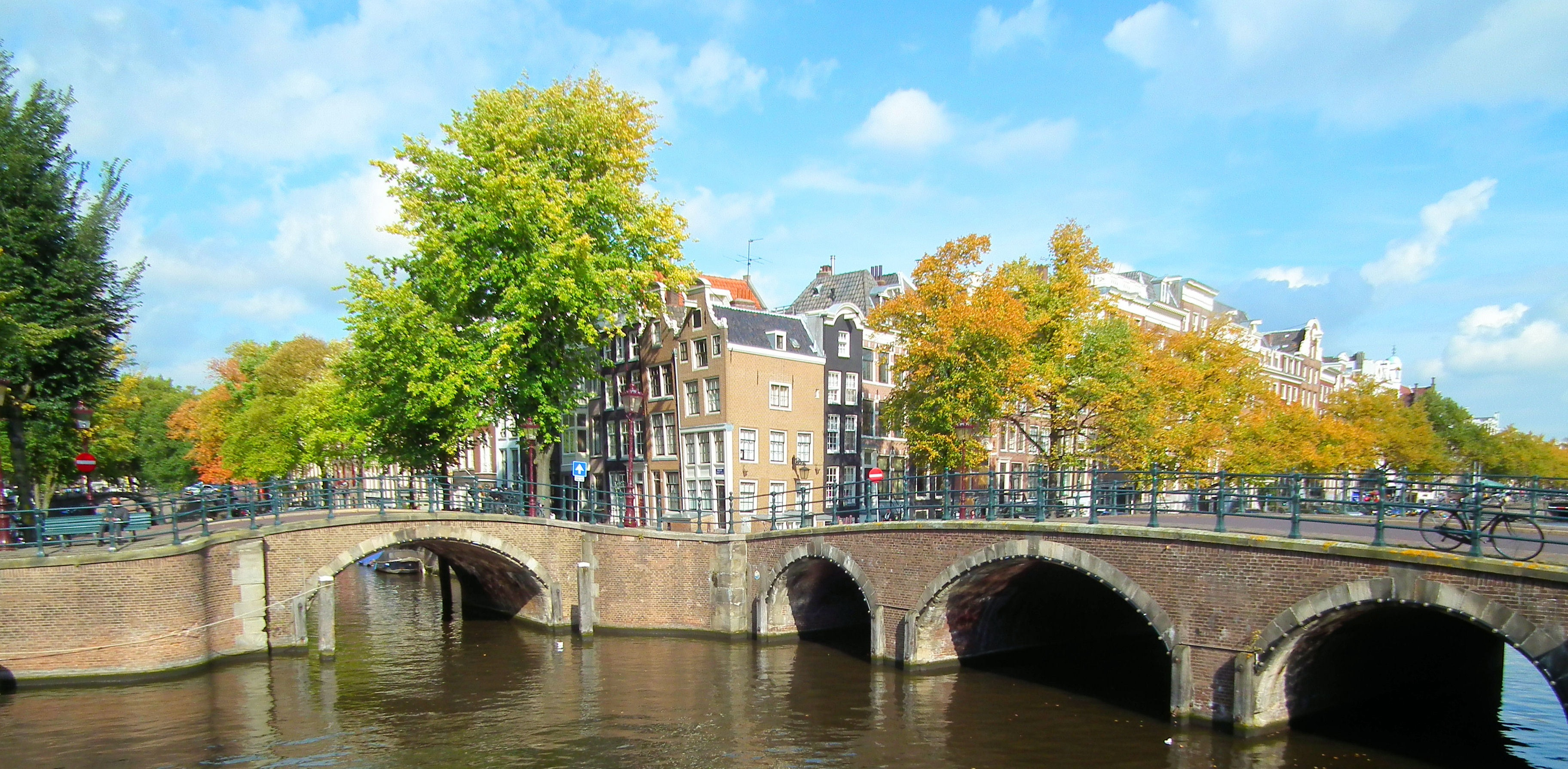 Amsterdam, hoek Keizersgracht - Reguliersgracht; links brug 39 over de Reguliersgracht, rechts brug 38 over de Keizersgracht, een gemeentelijk monument